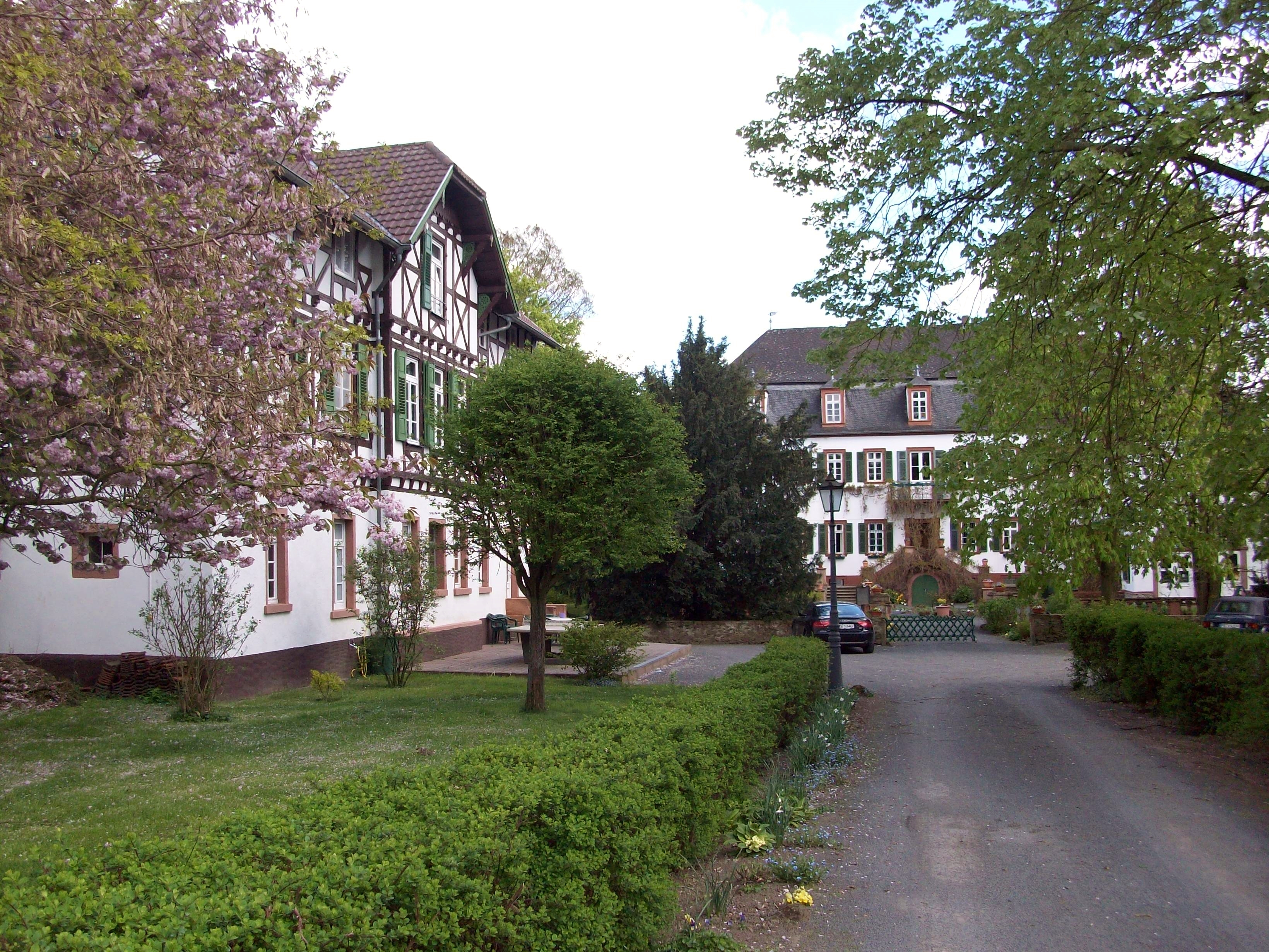 Echzeller Burg (eigentlich heute ein Schloss): links: Kavaliershaus - rechts: Schlossgebäude